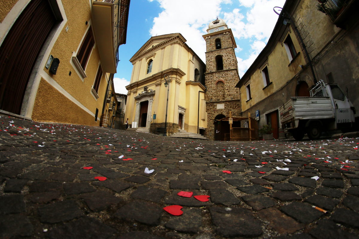 Chiesa madre e piazza antistante